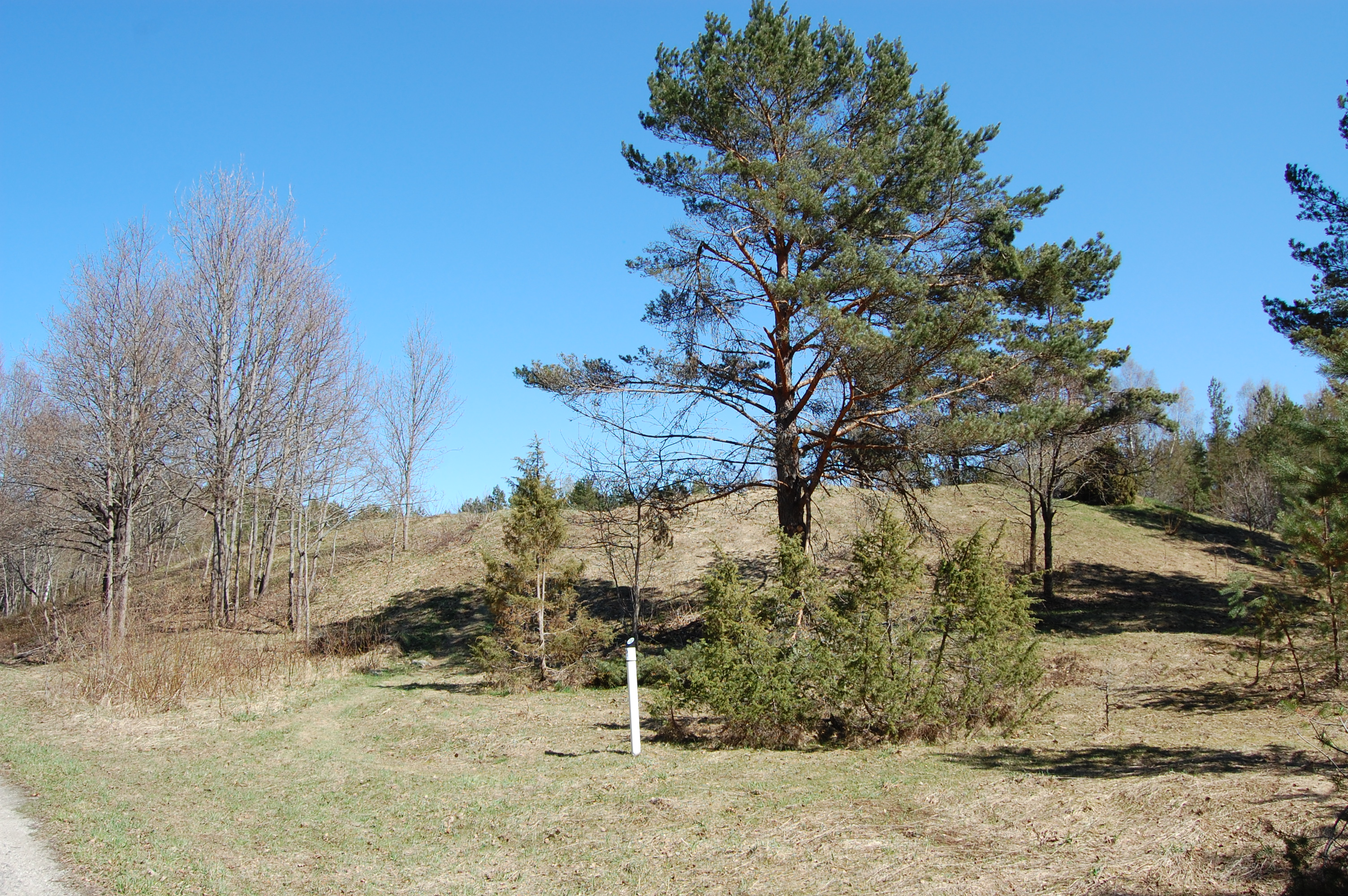 Hallimäe linnamägi. Taebla vald.